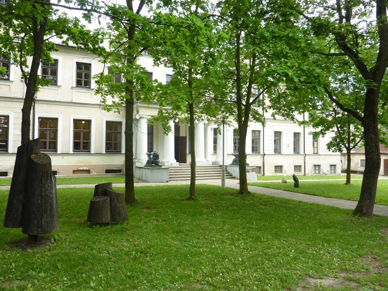 Šiaulių universiteto II rūmai